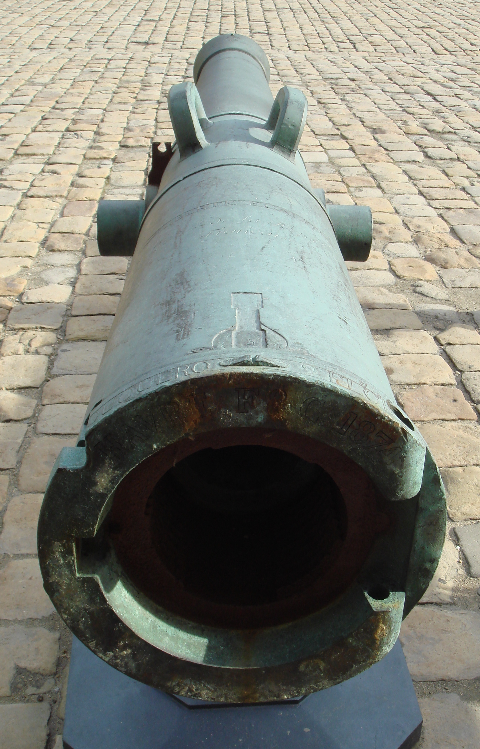 Gribeauval de 24, an 3 de la Republique,_rebuilt_in_1874_as_a_breech_loader